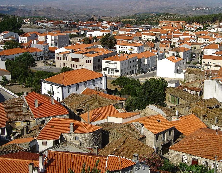 Cidade de Mêda